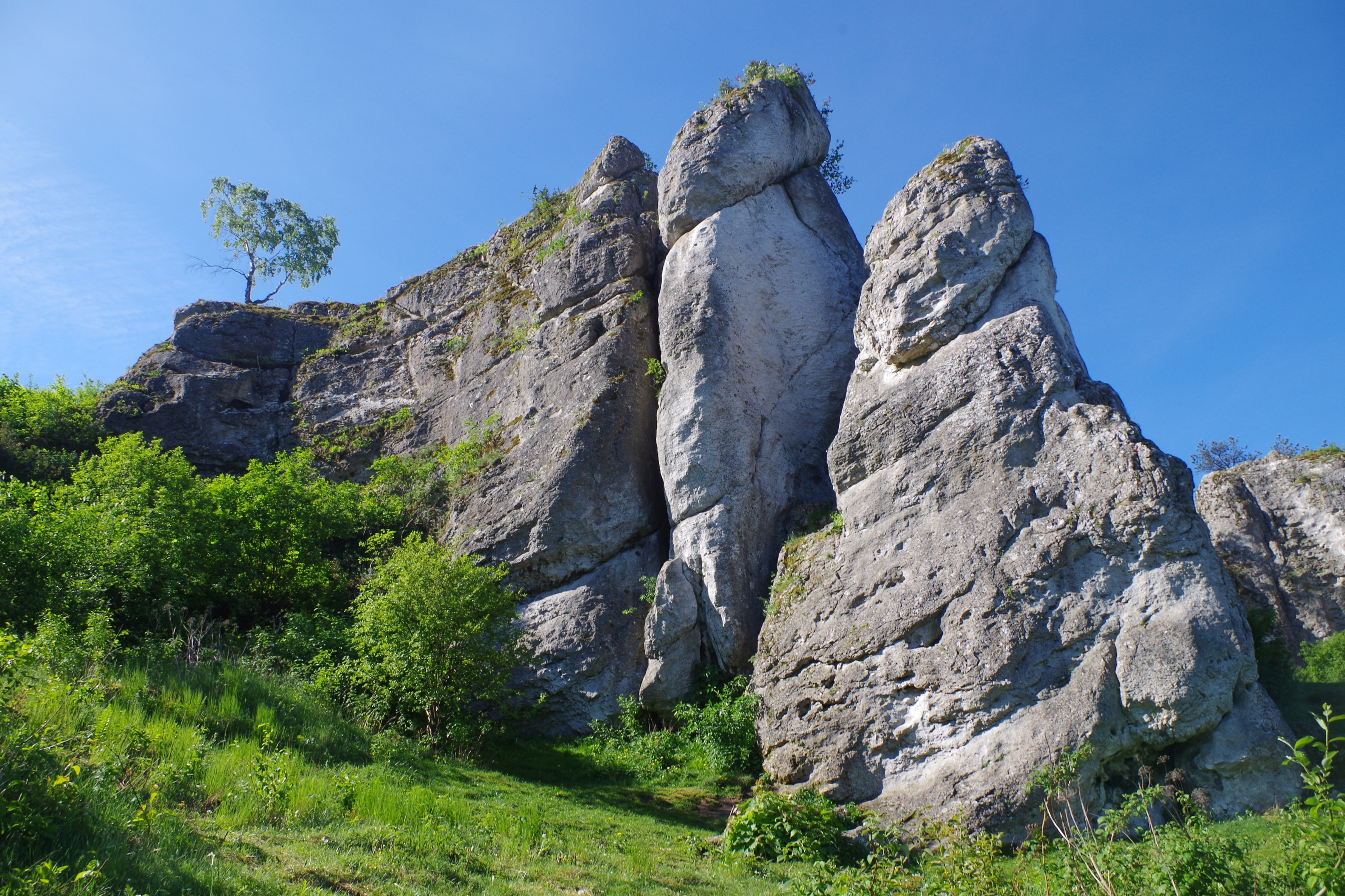 Mniszek i Szeroka Baszta w grupie Mirowskich Skał. Widok od północnego wschodu